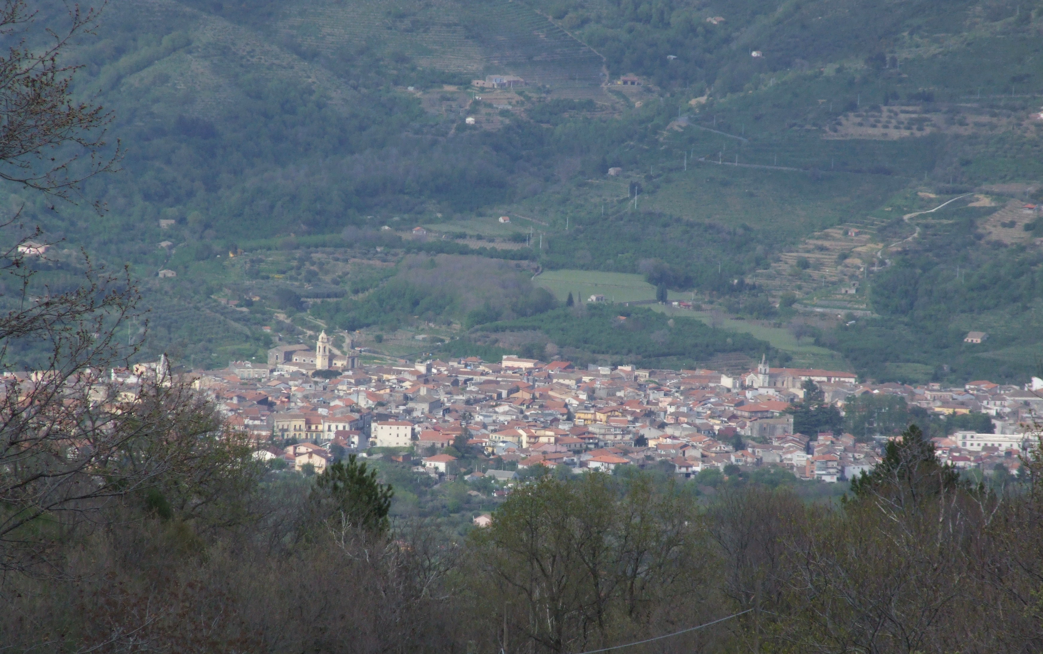 etna linguaglossa castelmola taormina volcano vulcano volcan messina sicily sicilia italia italy nature sea sun landscape free europe europa eu wallpaper castielli resolution vacation holiday travel flight creative commons zero CC0 CC panoramio flickr google GNU GIMP